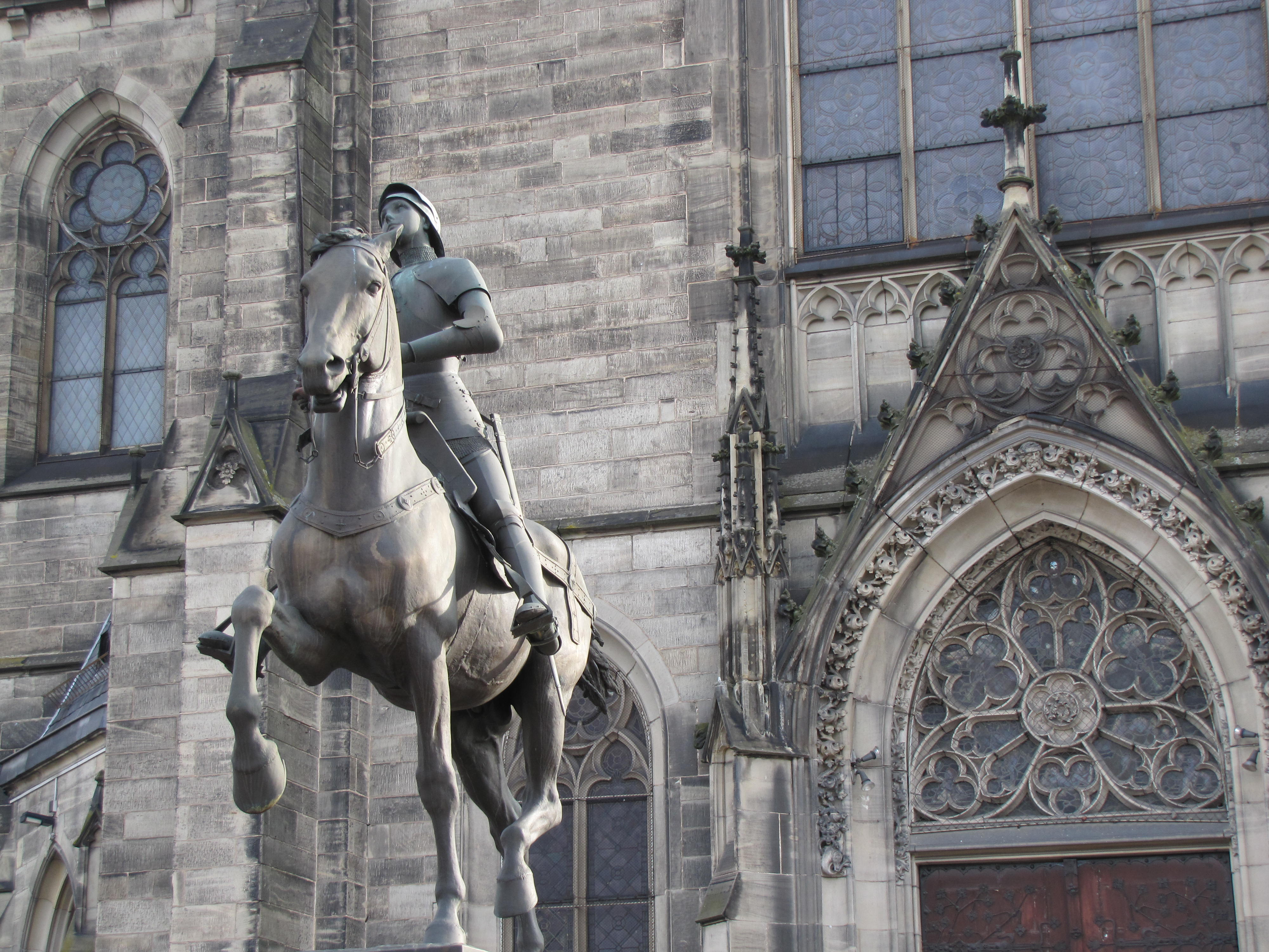 Alsace, Bas-Rhin, Église catholique Saint-Maurice (1899) de Strasbourg, avenue de la Forêt-Noire. Statue équestre de Jeanne d'Arc - Sculpteur Paul Dubois (1829-1905), autre exemplaire à Paris.